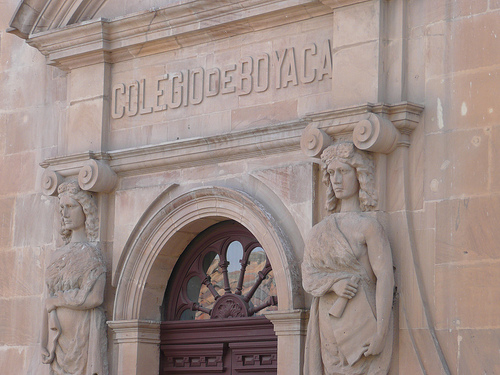 Frontis Repúblicano del Colegio de Boyacá, Calle 19 con Carrera 11 - Tunja, Boyacá Colombia